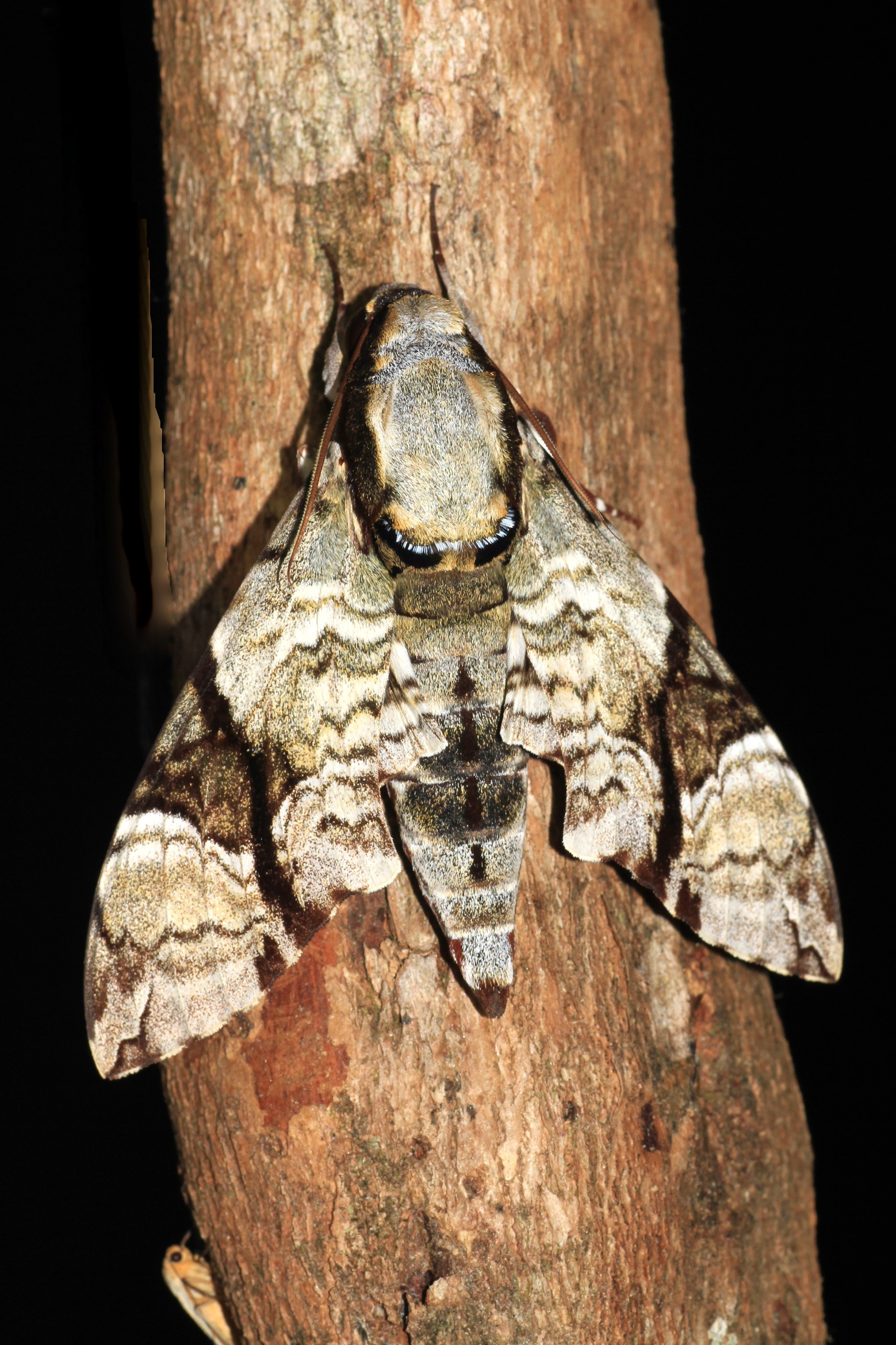 Borneo, Trusmadi hill dipterocarp forest, 1100m